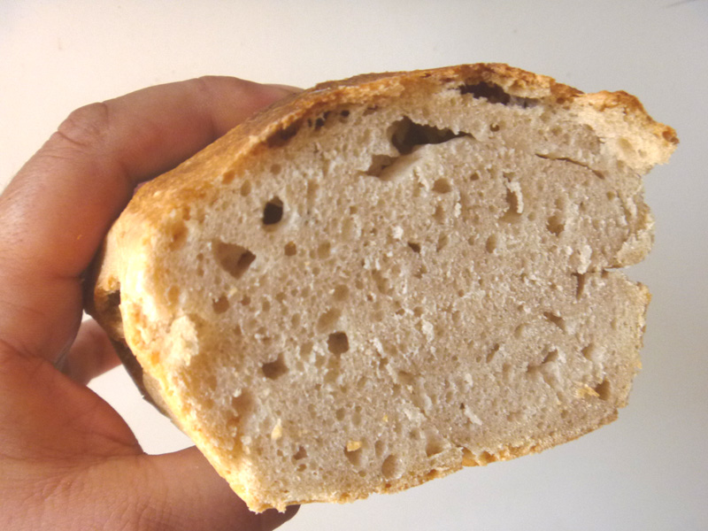 An tamm bara-mañ a ziskouez mat kevioù ar minvig savet gant ar CO2